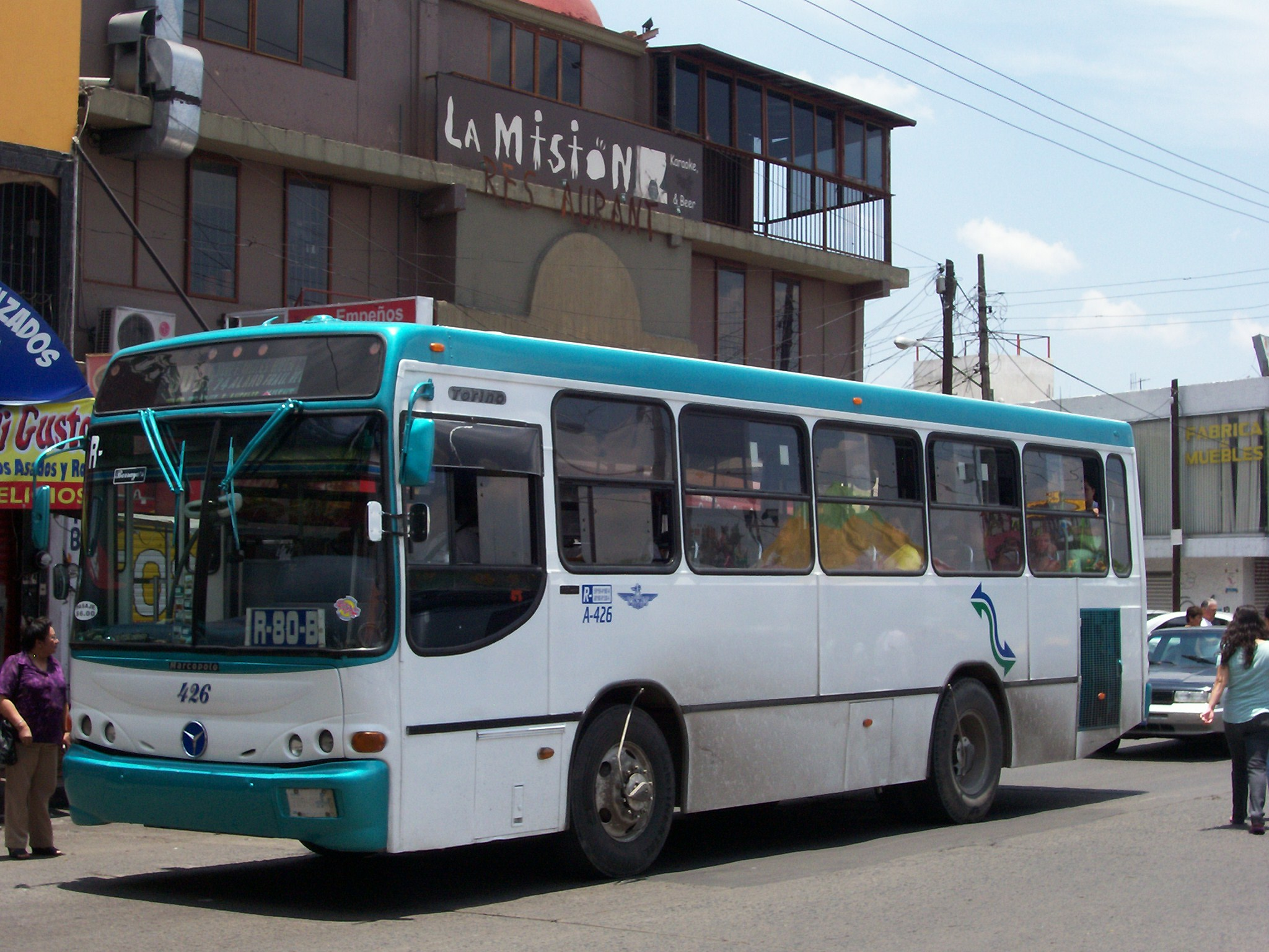 Autobus de la empresa de Transporte guadalajara, Alianza de Camioneros Jalisco A.C.